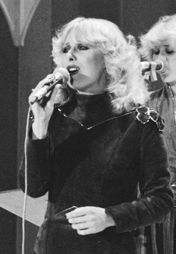 Bonnie St. Claire tijdens het Nationaal Songfestival 1982